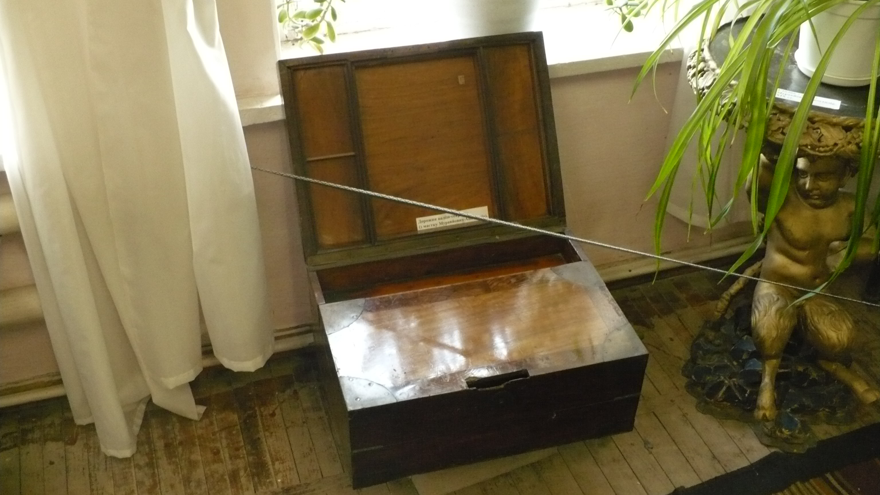 Миргородський Краєзнавчий музей (усередині 50). Внутрішній вигляд Миргородського Краєзнавчого музею